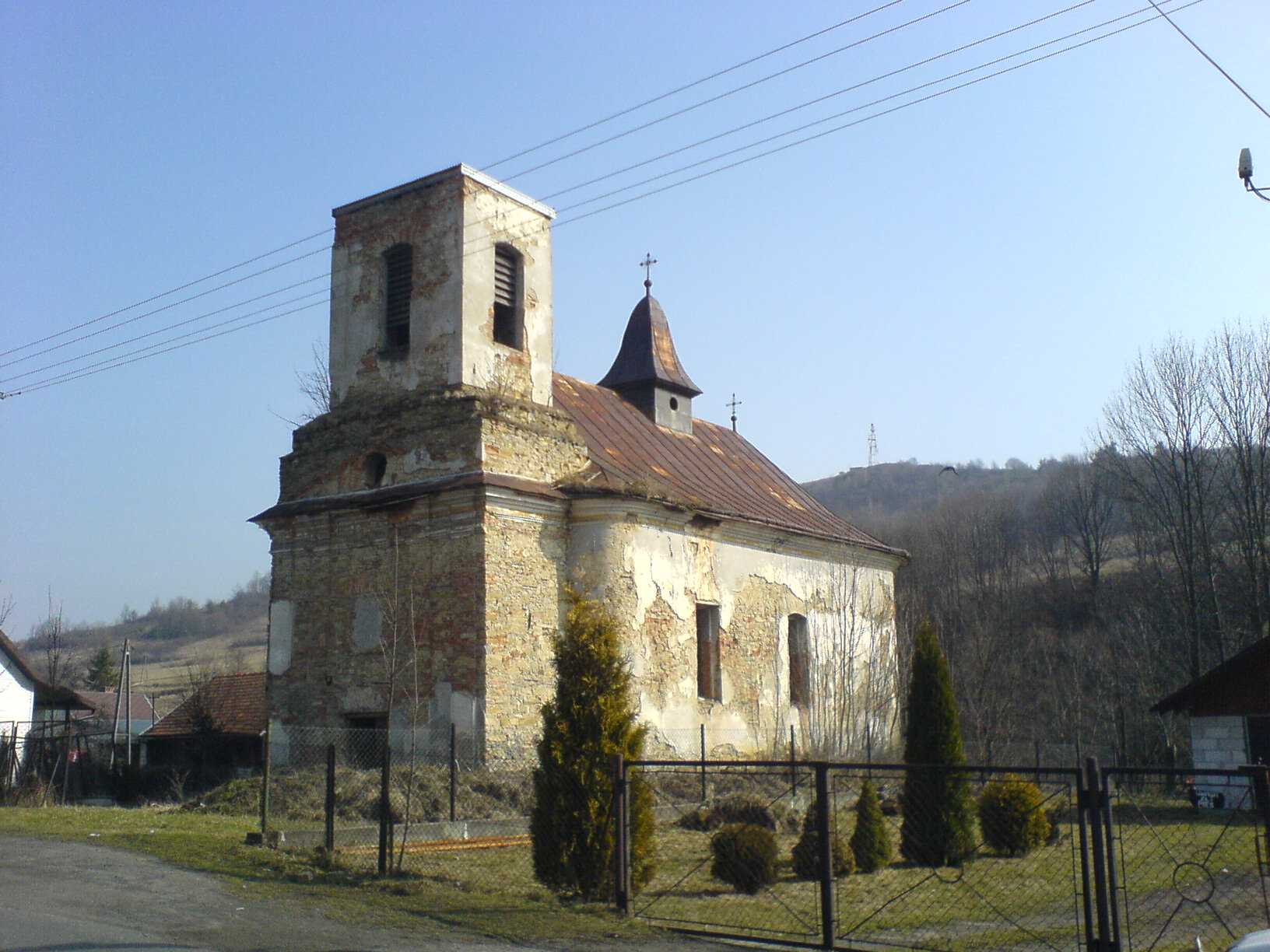 Dawna cerkiew greckokatolicka w Tarnawie Górnej